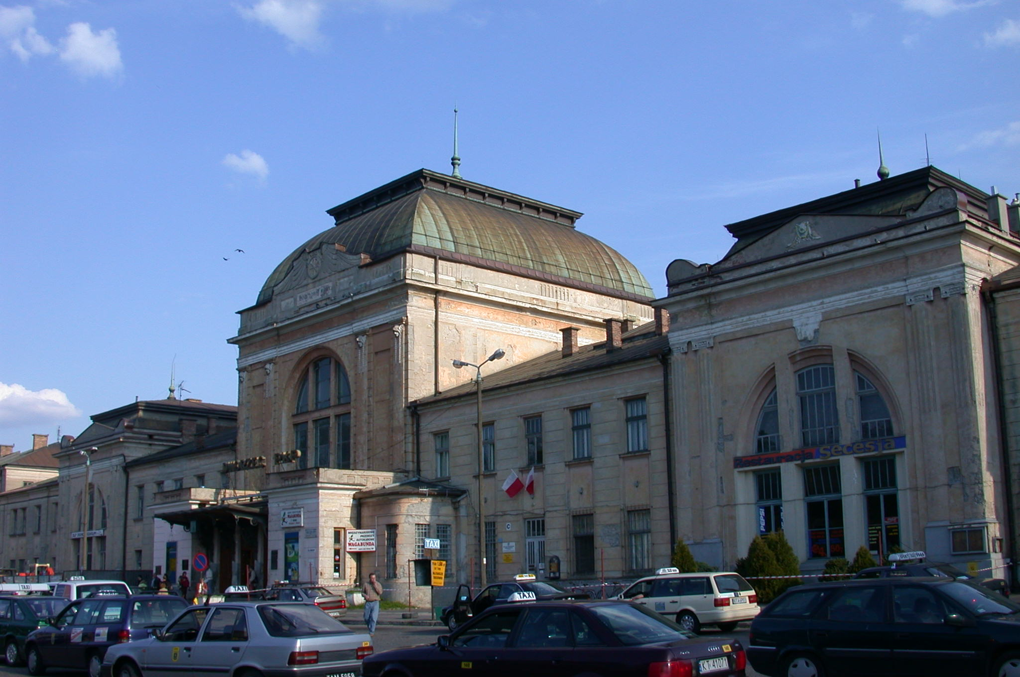 Zabytkowy dworzec w Tarnowie